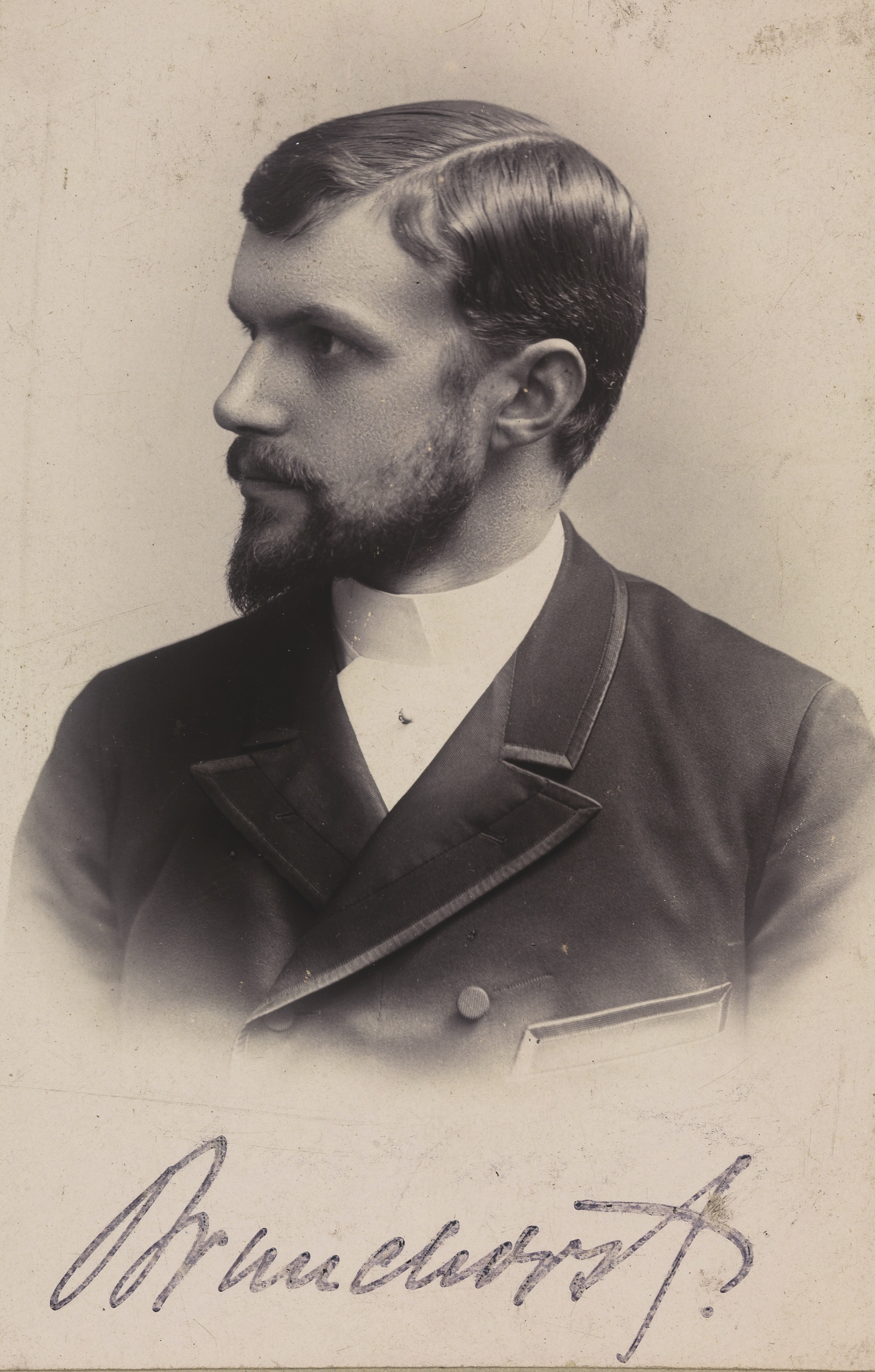 Jørgen Brunchorst, diplomat. Depicted person: Brunchorst, Jørgen (1862-1917) Depicted place: Bergen